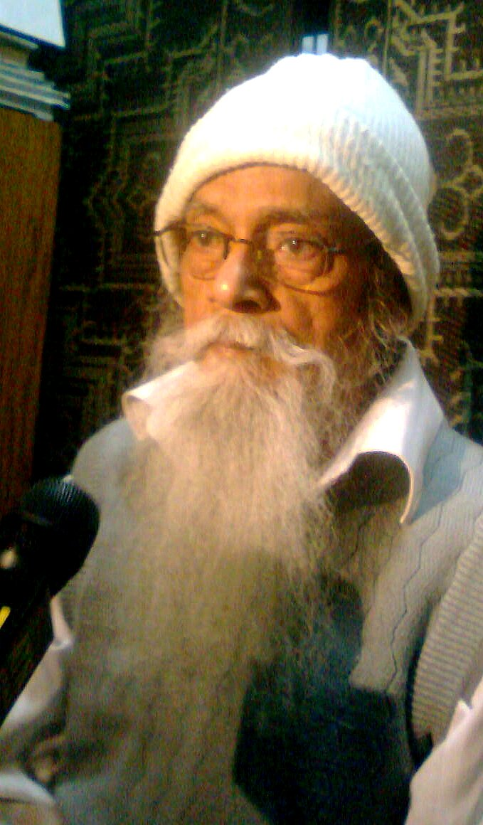 সুভাষ দত্ত